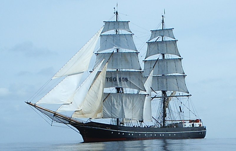 Bild der Brigg Roald Amundsen